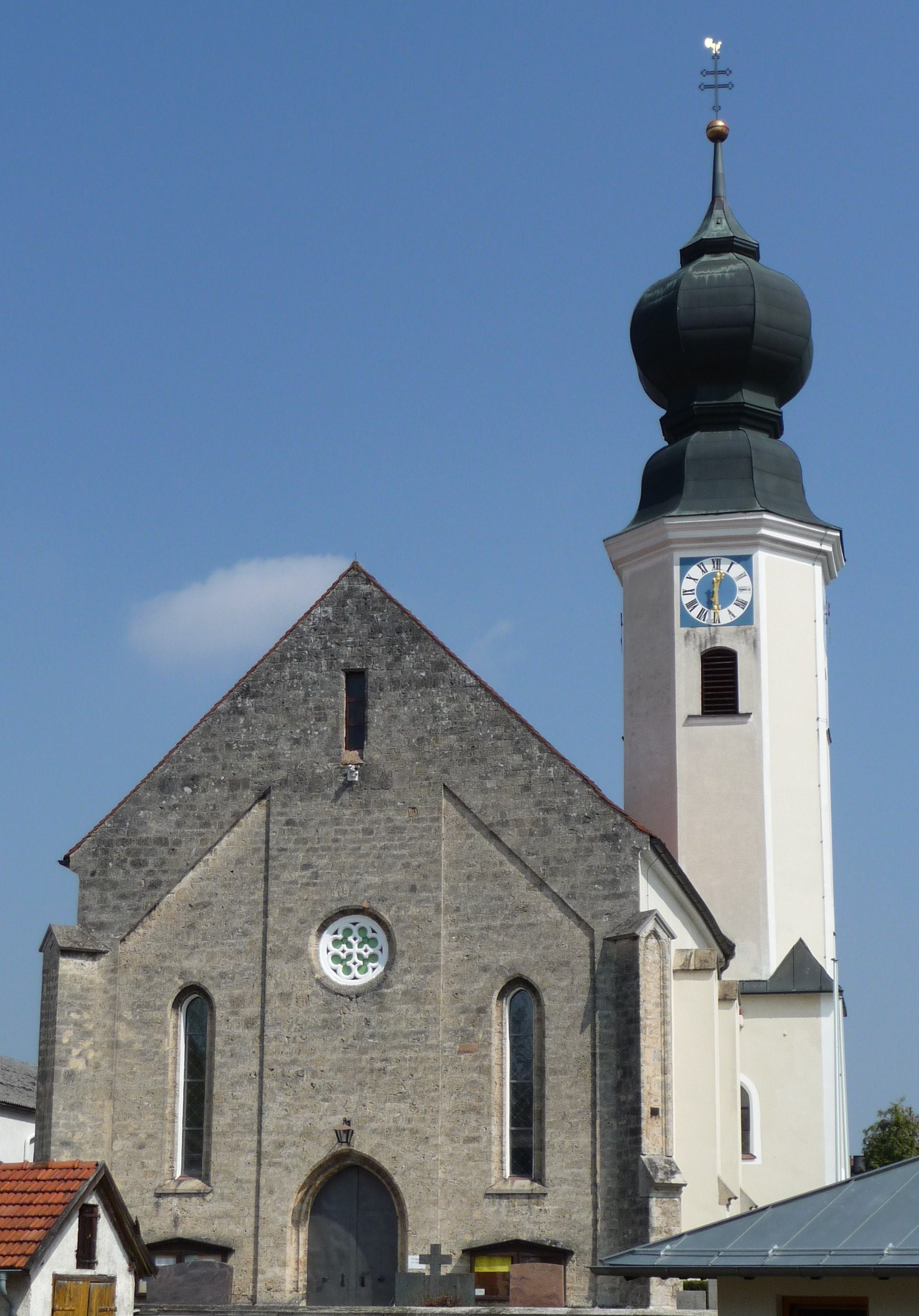 Die Expositurkirche St. Michael in Egglfing